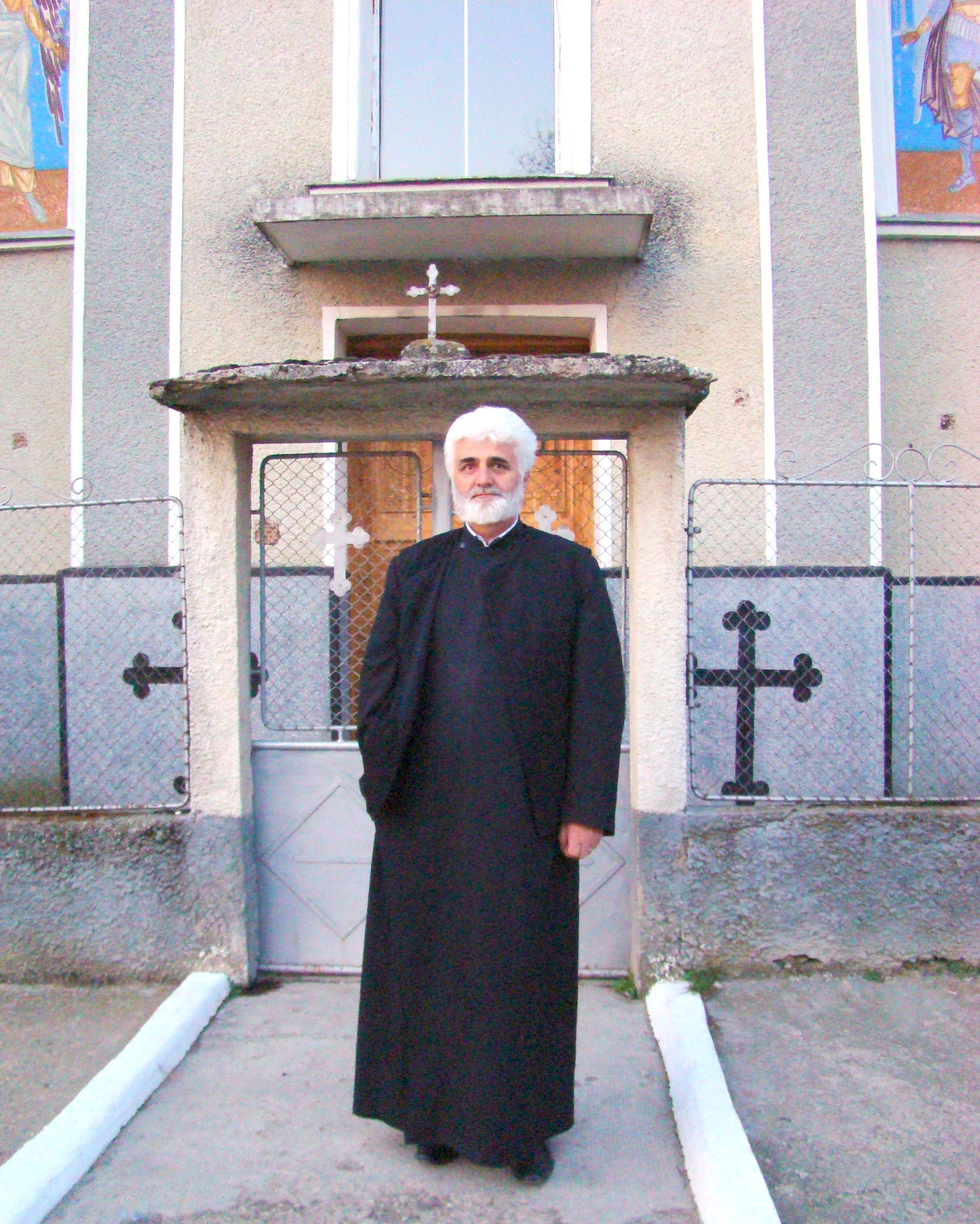 Biserica „Nașterea Maicii Domnului” din Homorog, județul Bihor